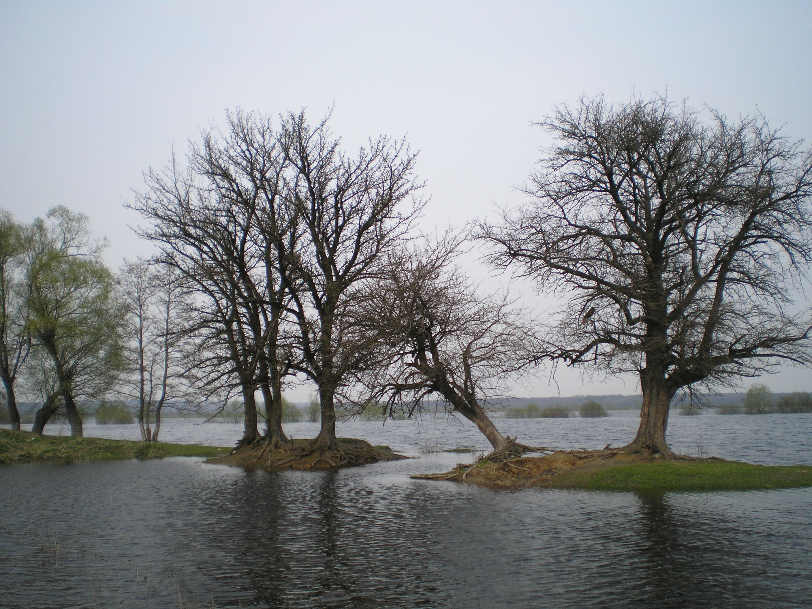 розлив